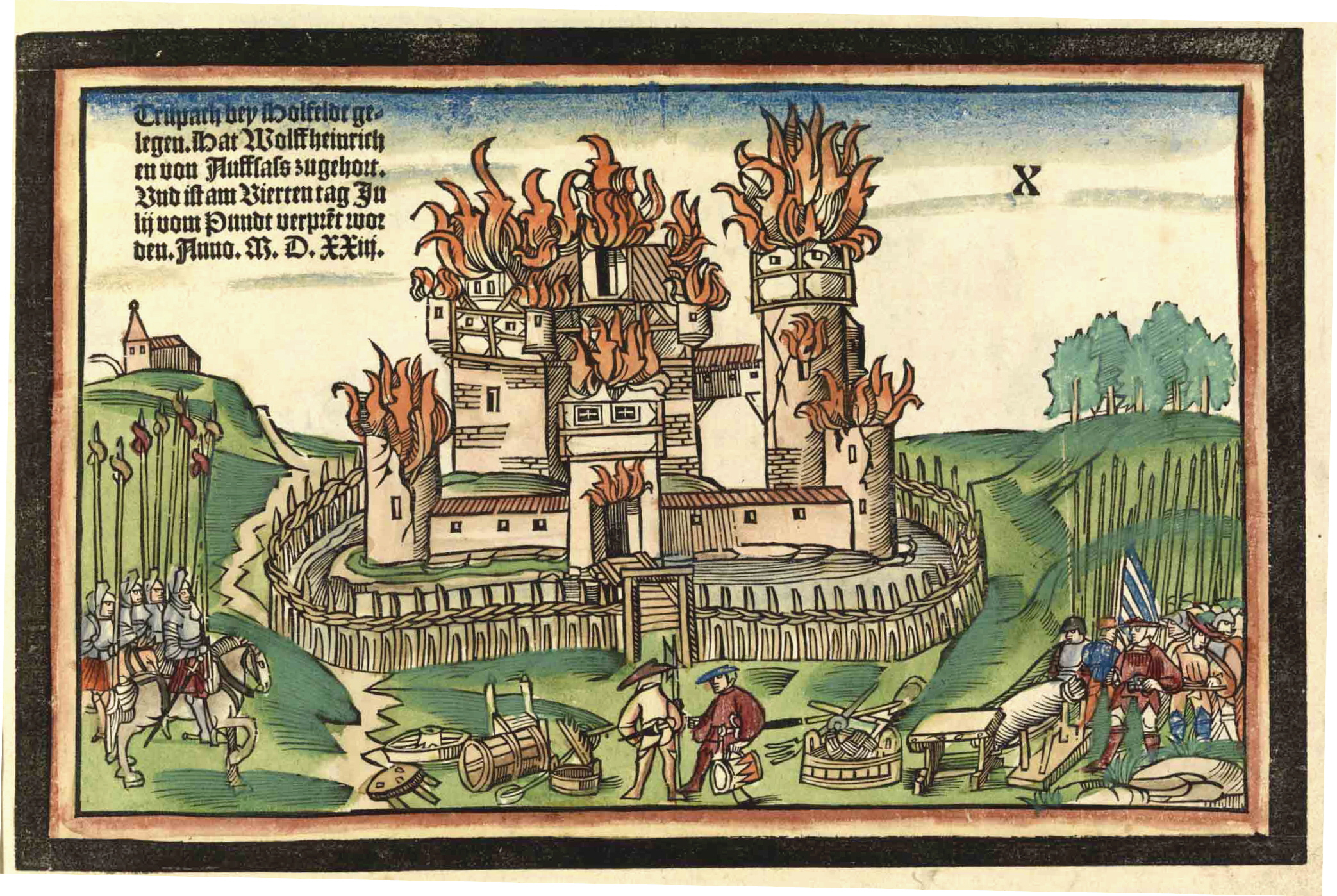 Holzschnitt des Hans Wandereisen: Zerstörung der Burg Truppach durch Truppen des Schwäbischen Bundes.